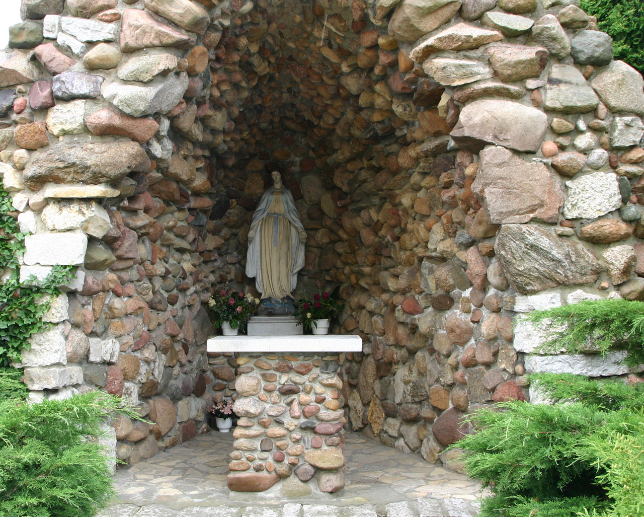 Rogów Opolski - wieś w Polsce, w powiecie opolskim.